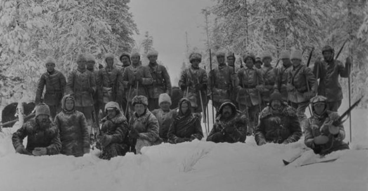 Heimosotureja Aunuksen retkellä talvella 1919–1920